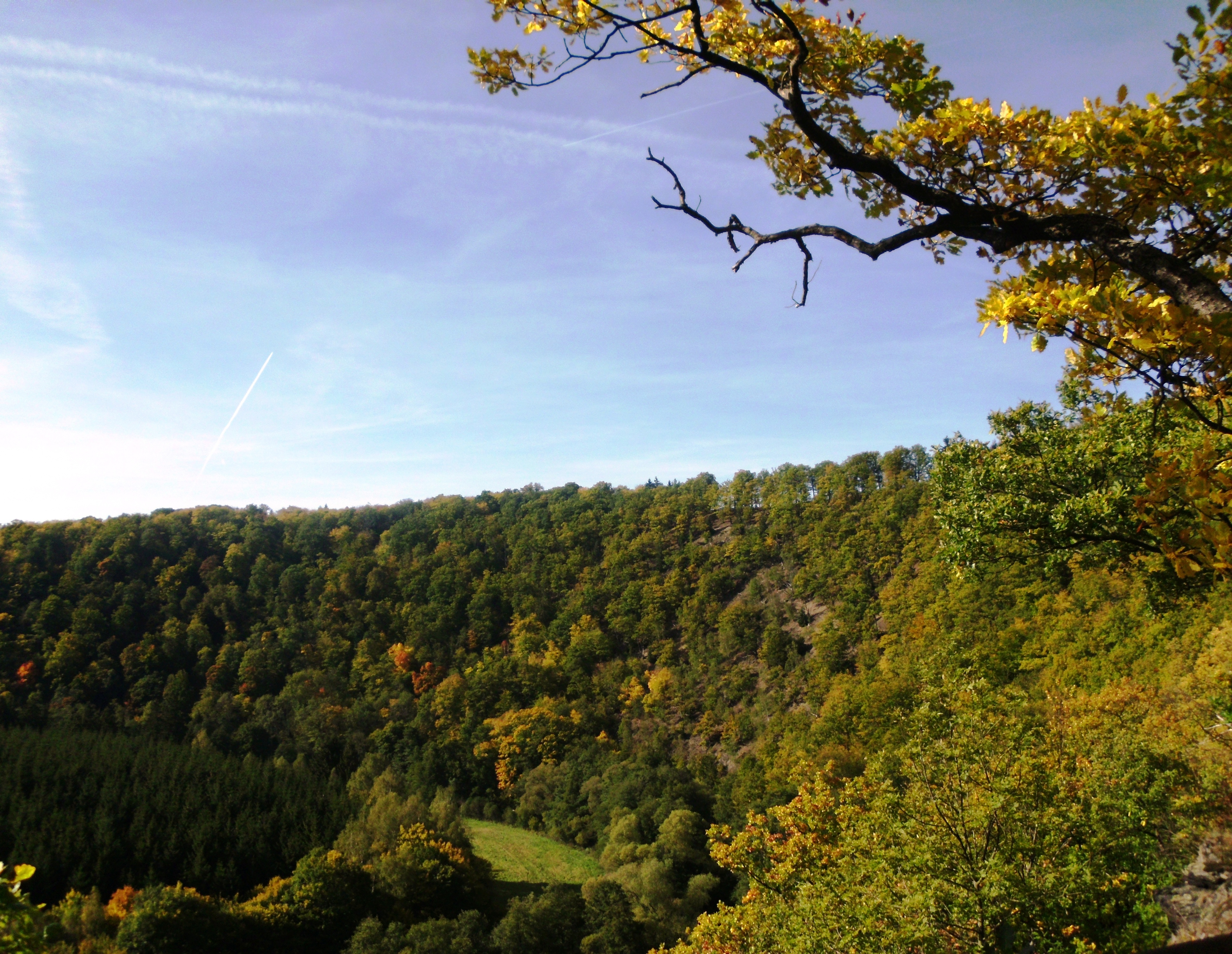 Aussicht vom Wilhelmsblick, Treseburg, Stadt Thale